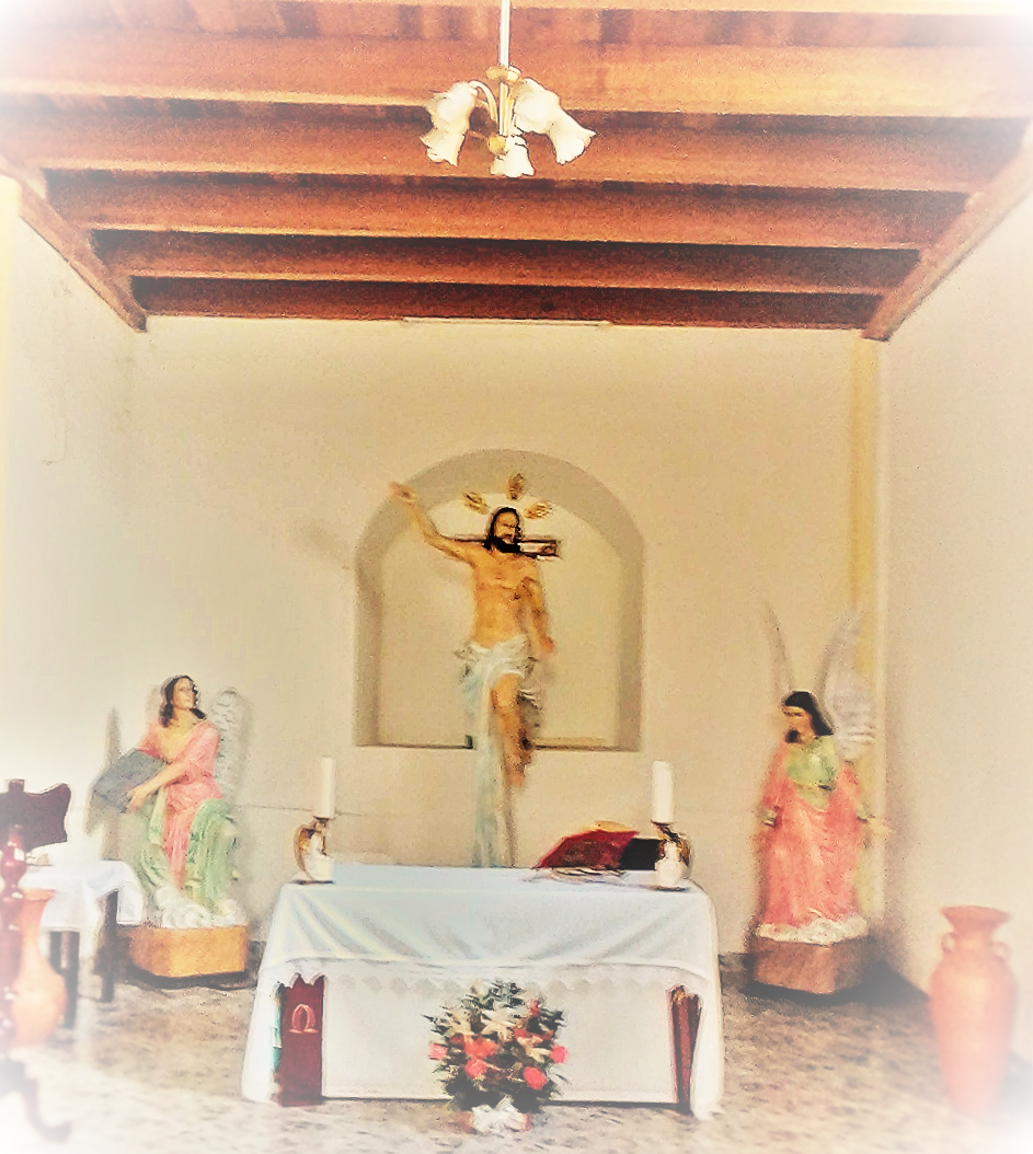 Capilla Oratorio de la Catedral de Santa Rosa de Osos